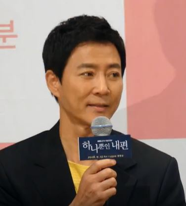 12일 오후 서울시 강남구 논현동 임피리얼팰리스 서울 호텔에서 KBS 새 주말드라마 '하나뿐인 내편'의 제작발표회가 열렸다.